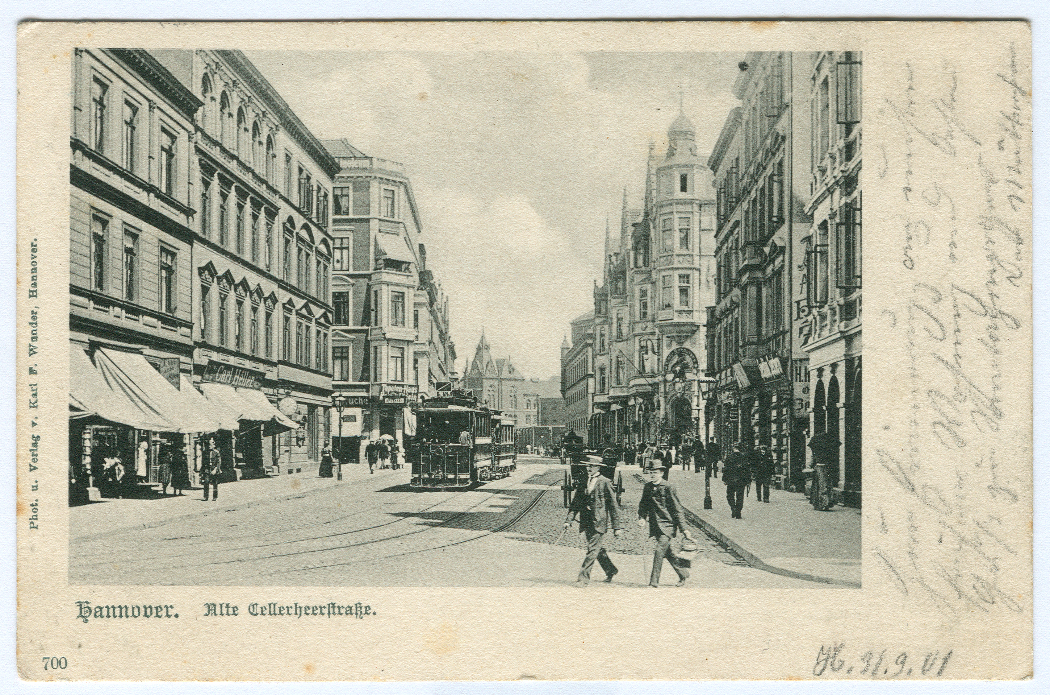 Originalbeschriftung: „Phot. und Verlag Karl. F. Wunder, Hannover. Hannover. Alte Cellerheerstraße. 700“ Karl F. Wunder fotografierte um 1900 vom damals sehr viel kleineren Raschplatz durch die Alte Celler Heerstraße (heute Lister Meile). Es dürfte ein warmer Sommertag gegen 14.00 Uhr sein. Die Leute haben die Fenster geöffnet, eine Dame schützt ihren vornehmen Teint mit einem weißen Sonnenschirm. In der Bildmitte sieht man die Leibnizschule, von deren oberen Fenstern die Schüler direkt über die Mauern in den Hof des Gerichtsgefängnisses gucken konnten. Hier saßen später z.B. Fritz Haarmann ein, unter den Nationalsozialisten unter anderem auch Ernst Thälmann. Heute steht dort, hinter dem vergrößerten Raschplatz und der Autoüberführung, der Pavillon, davor das Denkmal zur Erinnerung an die Opfergruppen der Nationalsozialisten an diesem Ort. Die Straße nach links auf dem Bild, entlang der Gefängnismauer, hieß „Am Justizgebäude“, rechts Hallerstraße. Die Straßenbahn kommt von links aus der Rundestraße, der zuvor sogenannten „Umfuhr“ um die älteren Bahnhofsgebäude. Im Eckhaus links konnten sich Reisende im „Cafe Hannover“ erfrischen. Im Vordergrund links, bei den Markisen der Firma „Carl Heller“ marschiert ein einzelner Polizist mit Pickelhaube. Das große Tapeten-Haus dahinter warb auf dem Dach auch mit dem Verkauf von Linoleum.